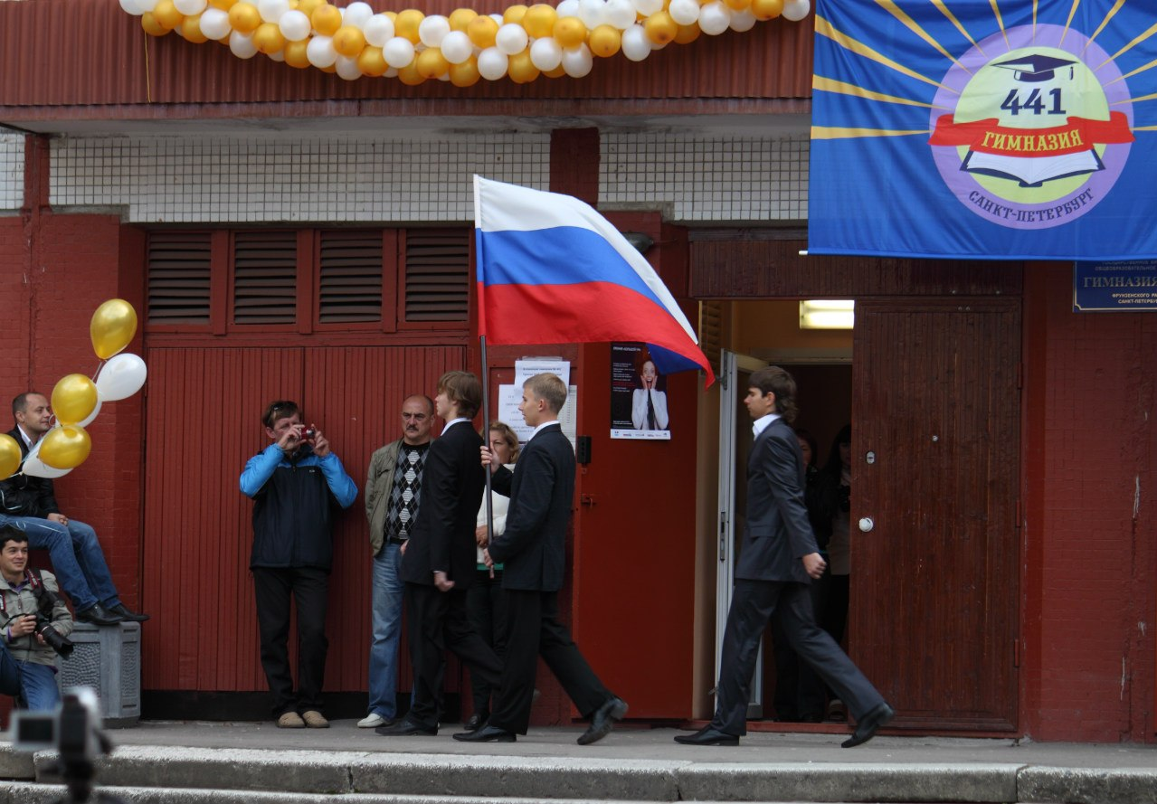 Gimnasium 441